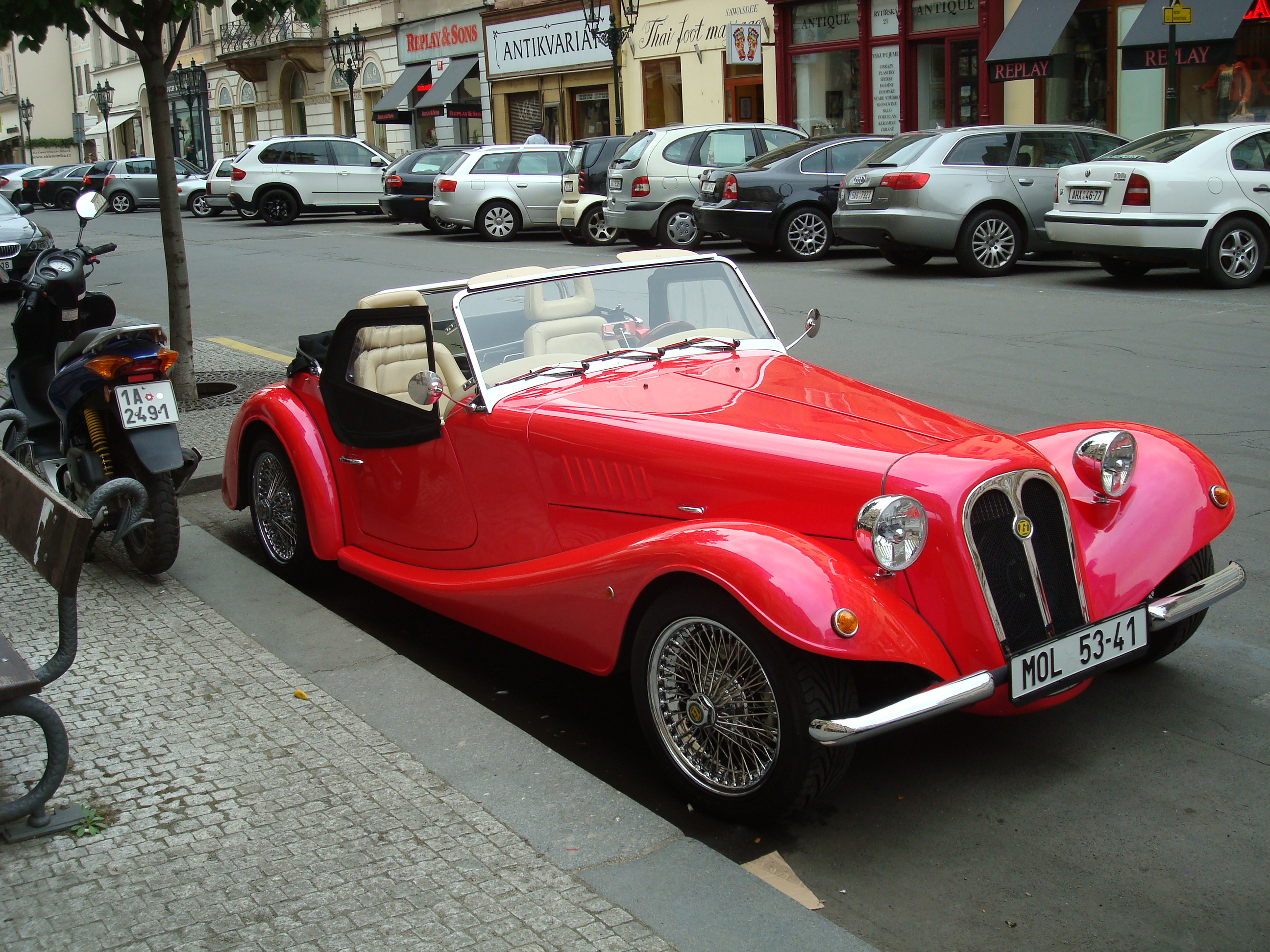 Praha 2009